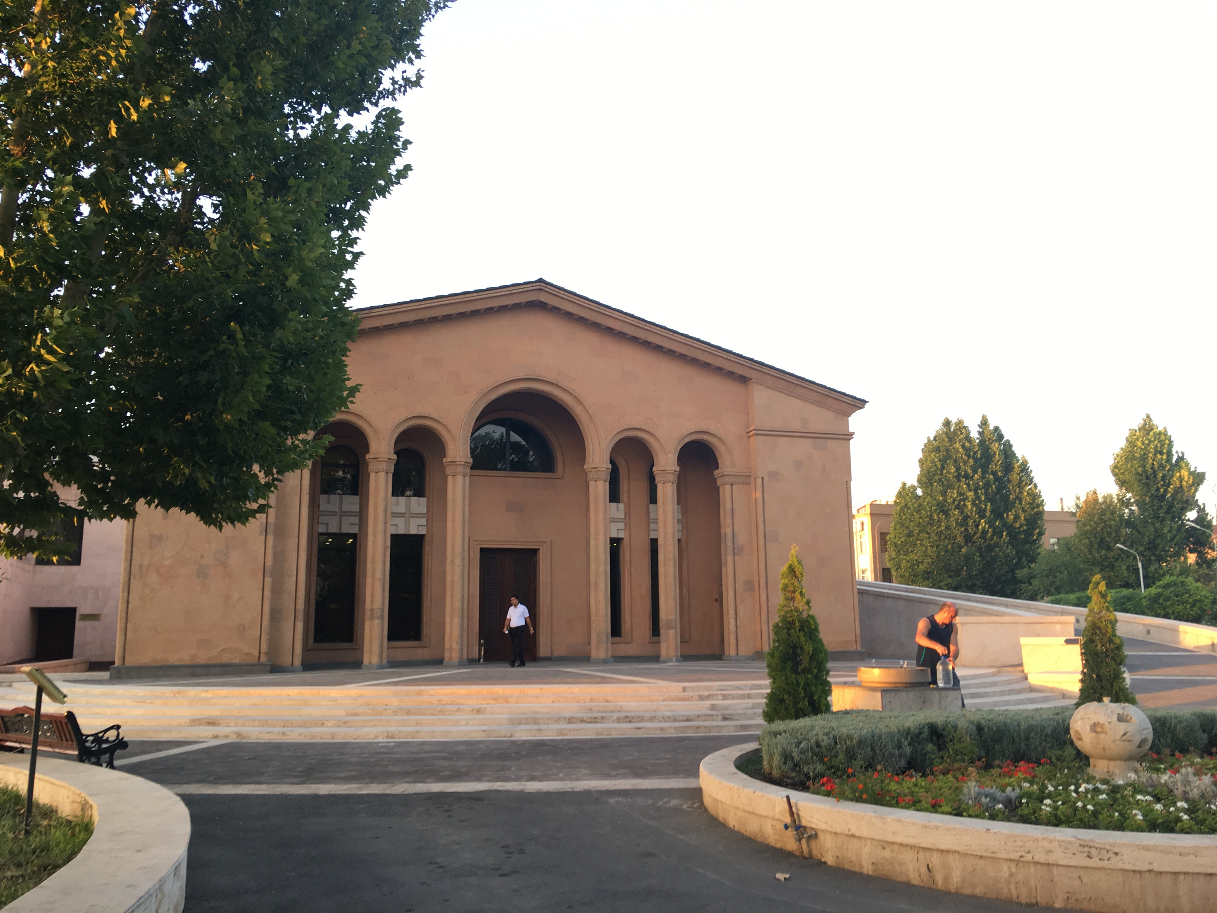 Կոմիտասի թանգարան-ինստիտուտ, Երևան, Հայաստան